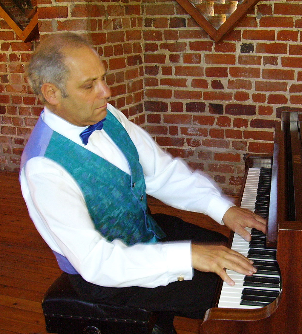 Le pianiste britannique Anthony Goldstone